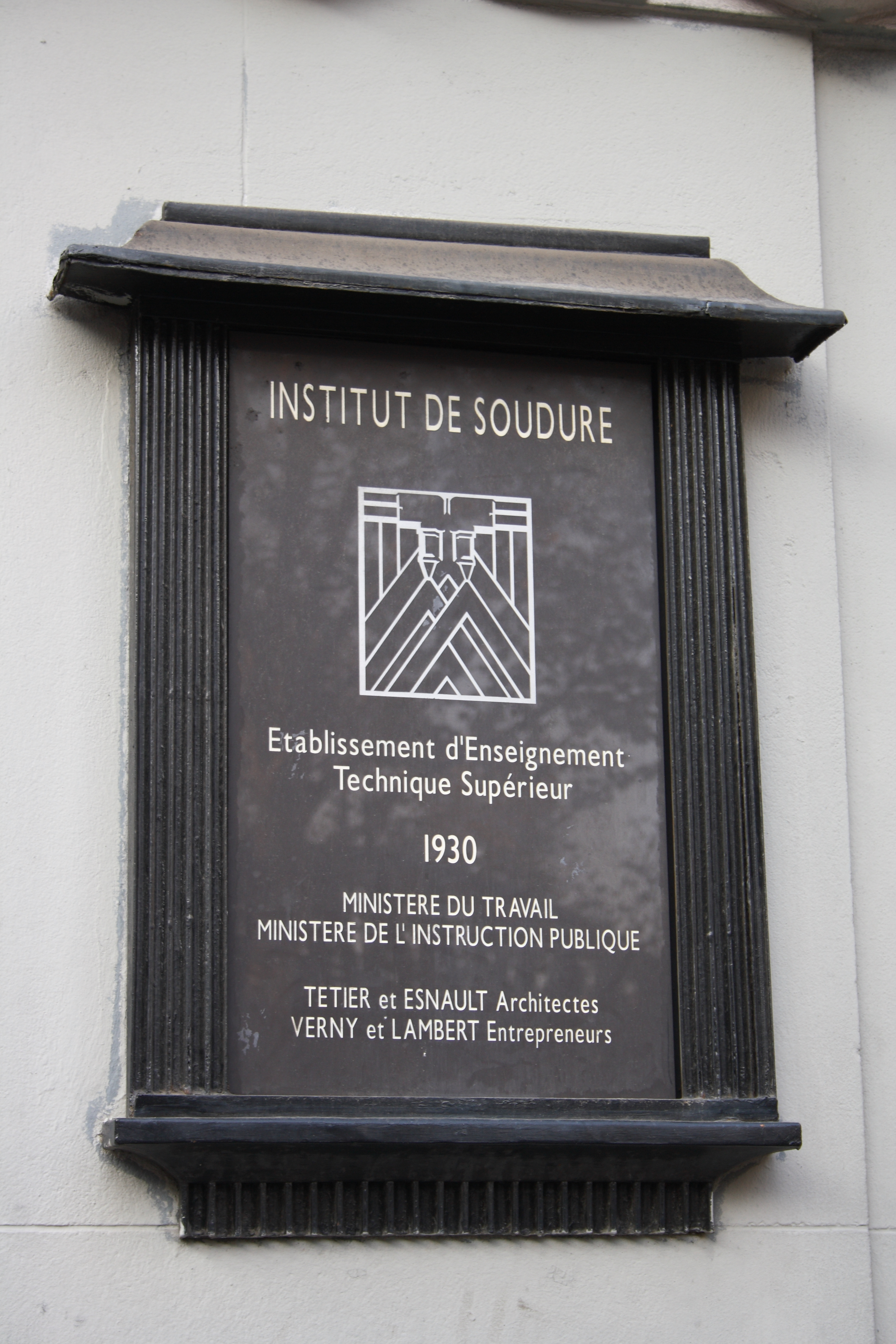 Ehemaliges Gebäude des Institut de Soudure, 32, Boulevard de la Chapelle im 18. Arrondissement von Paris; von 1930, Architekten: Tétier und Esnault